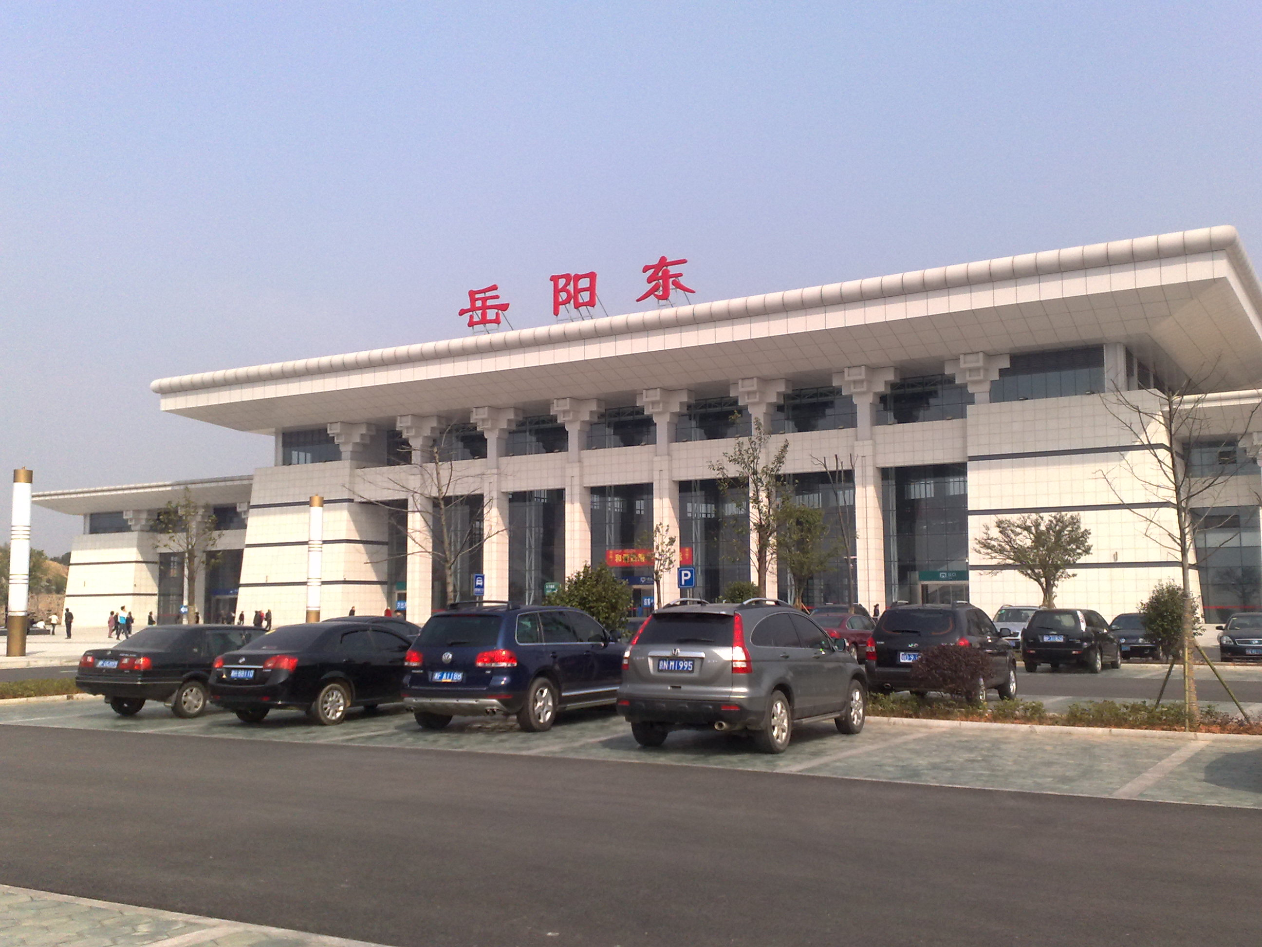 岳阳东火车站